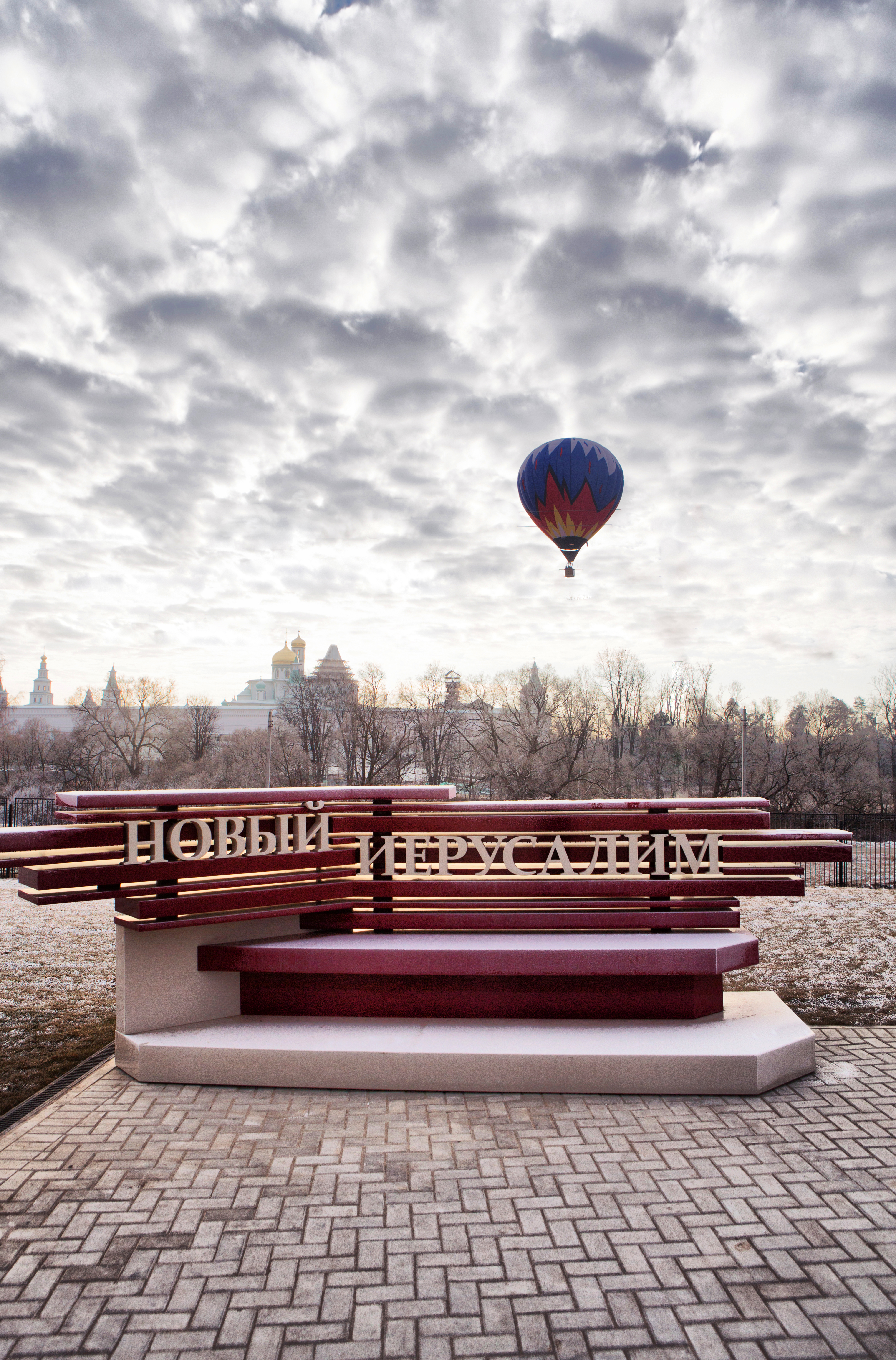 Вид на монастырь